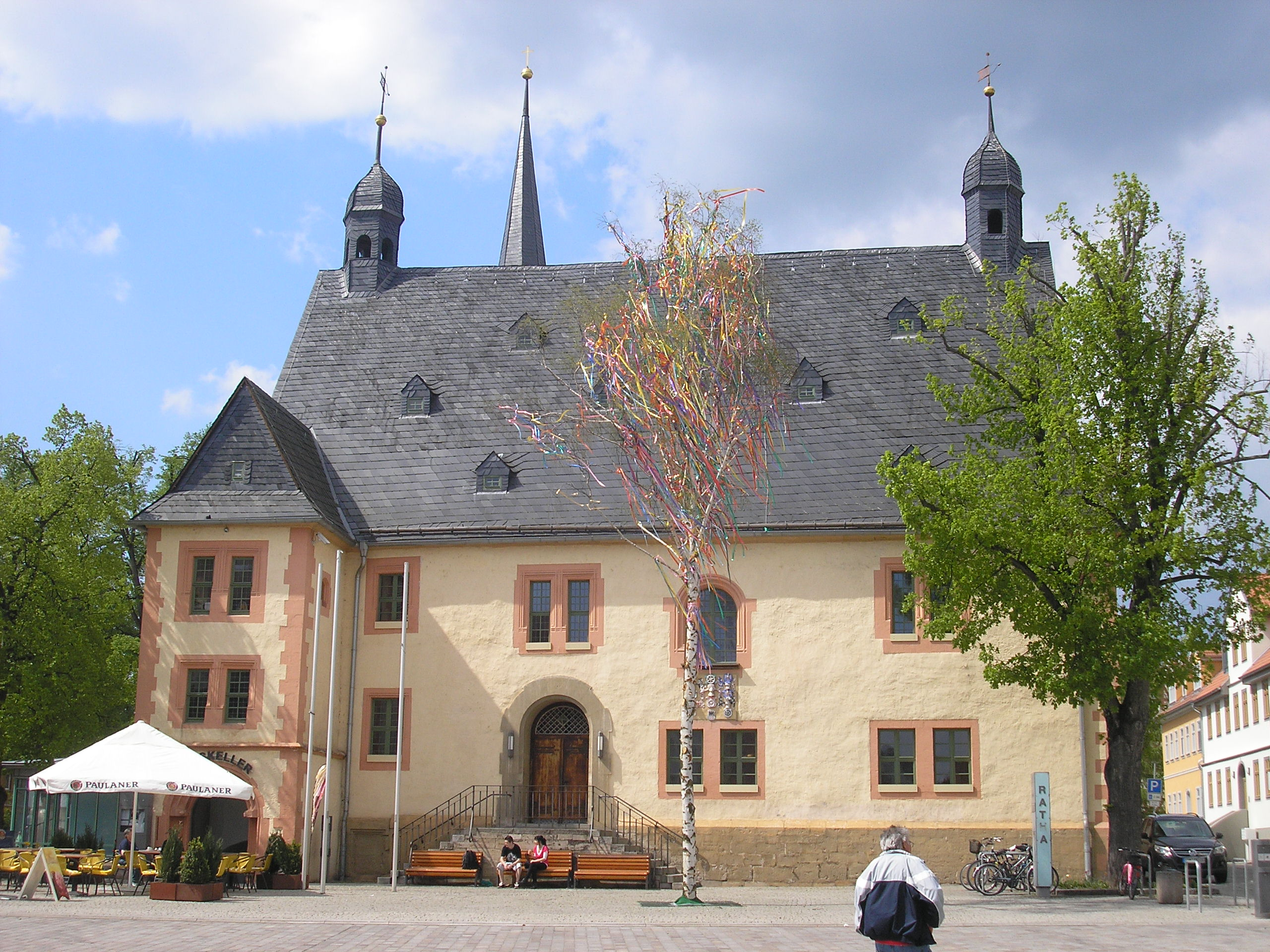 Das Rathaus von Sömmerda (Thüringen).